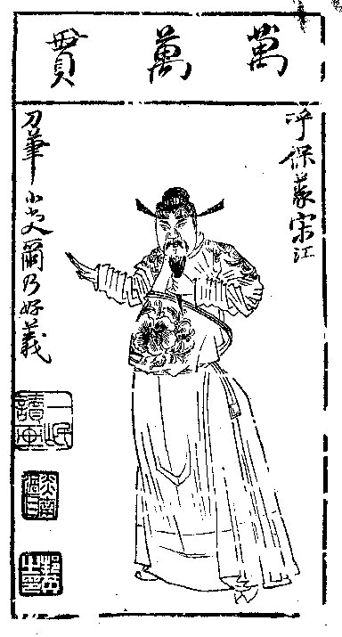 明 陈老莲 木刻版画《水浒叶子》宋江